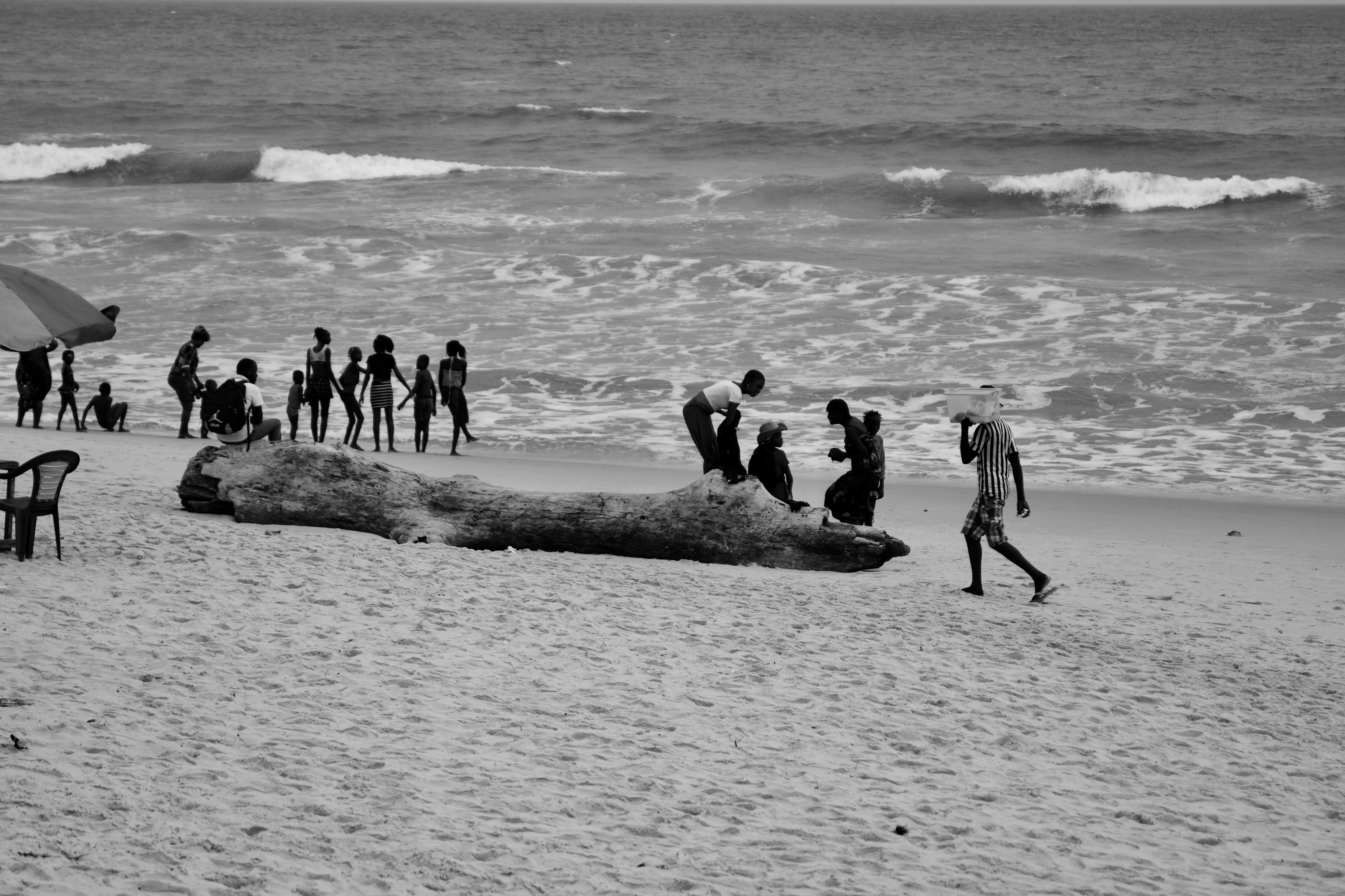 Photographie en noir et blanc d'une plage Congolaise (République du Congo) This is an image with the theme "Africa on the Move or Transport" from: Congo